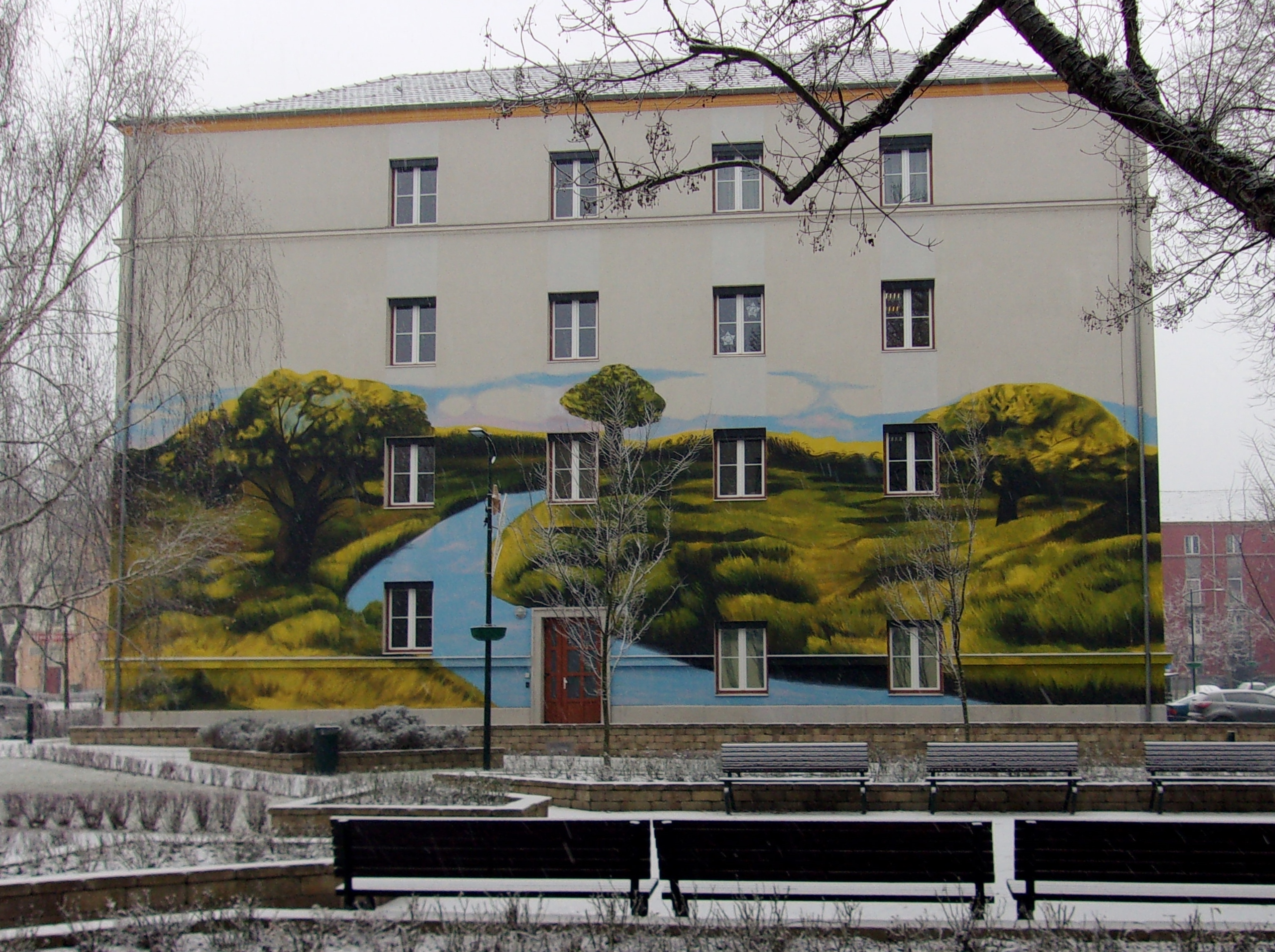 Színes falak program - Kazincbarcika, Munkácsy tér 1. - Szabó Julianna: Kanyargó patak